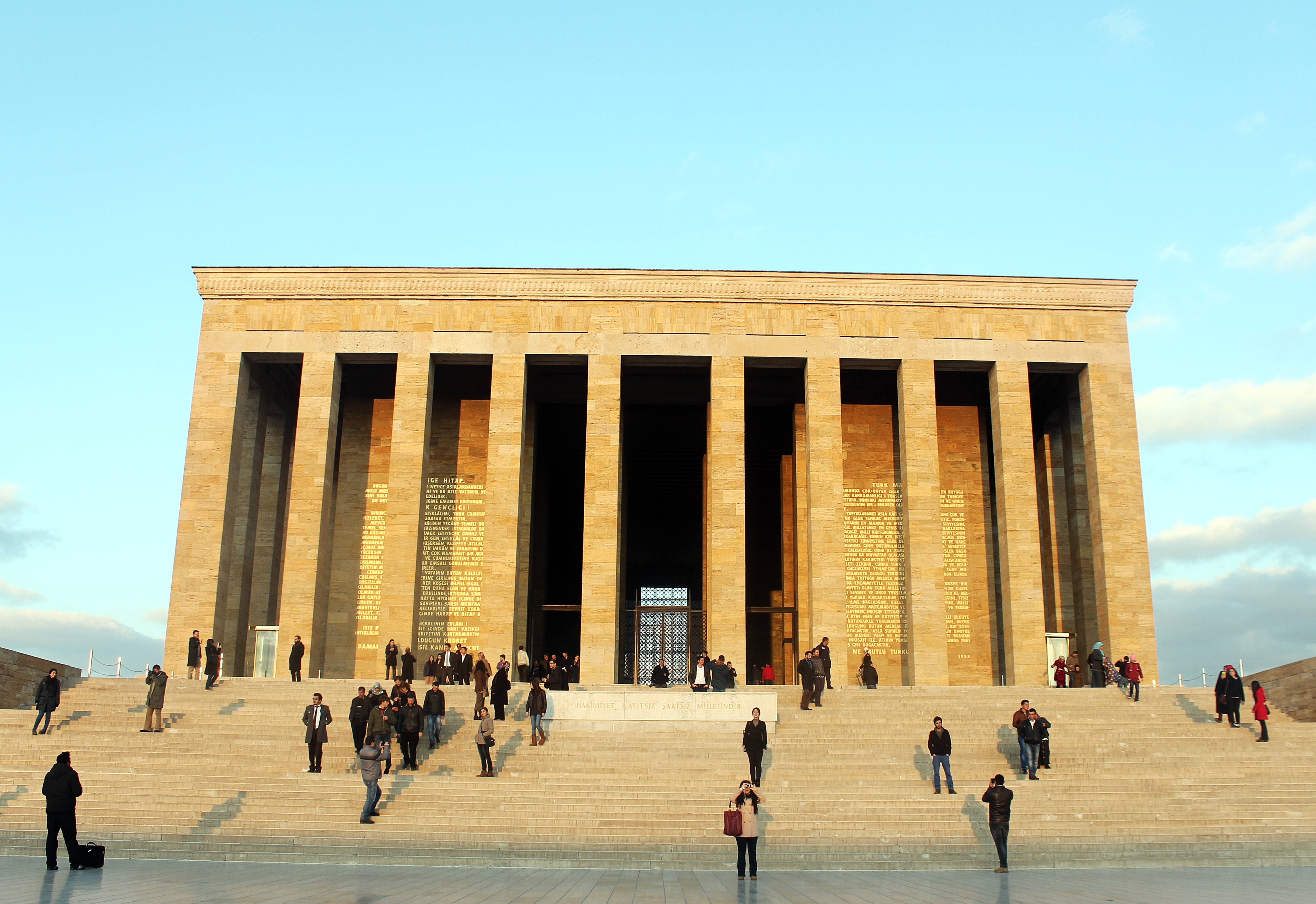 Ankara Anıtkabir